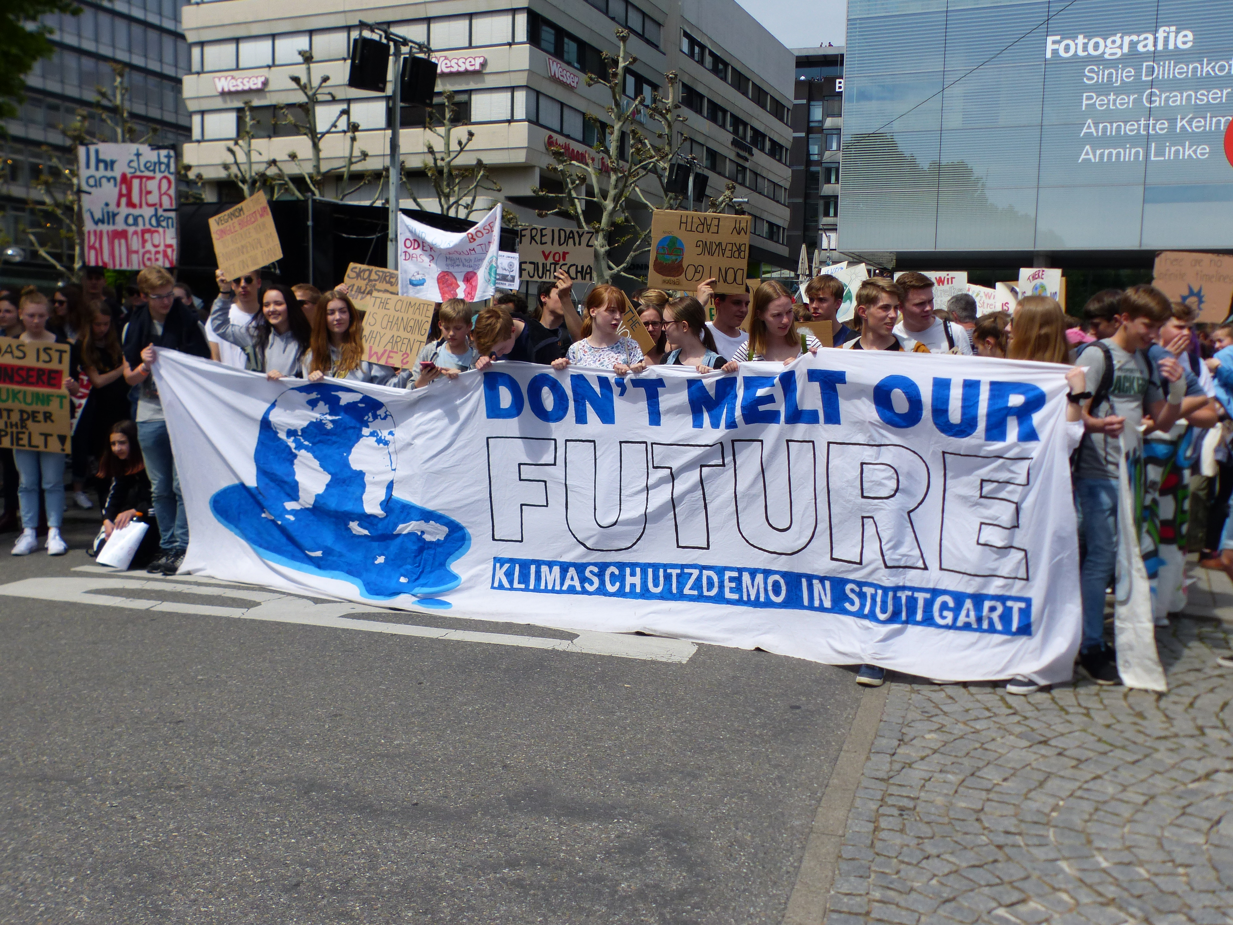 Frontbanner der Stuttgarter Fridays for future Bewegung am 24. Mai 2019